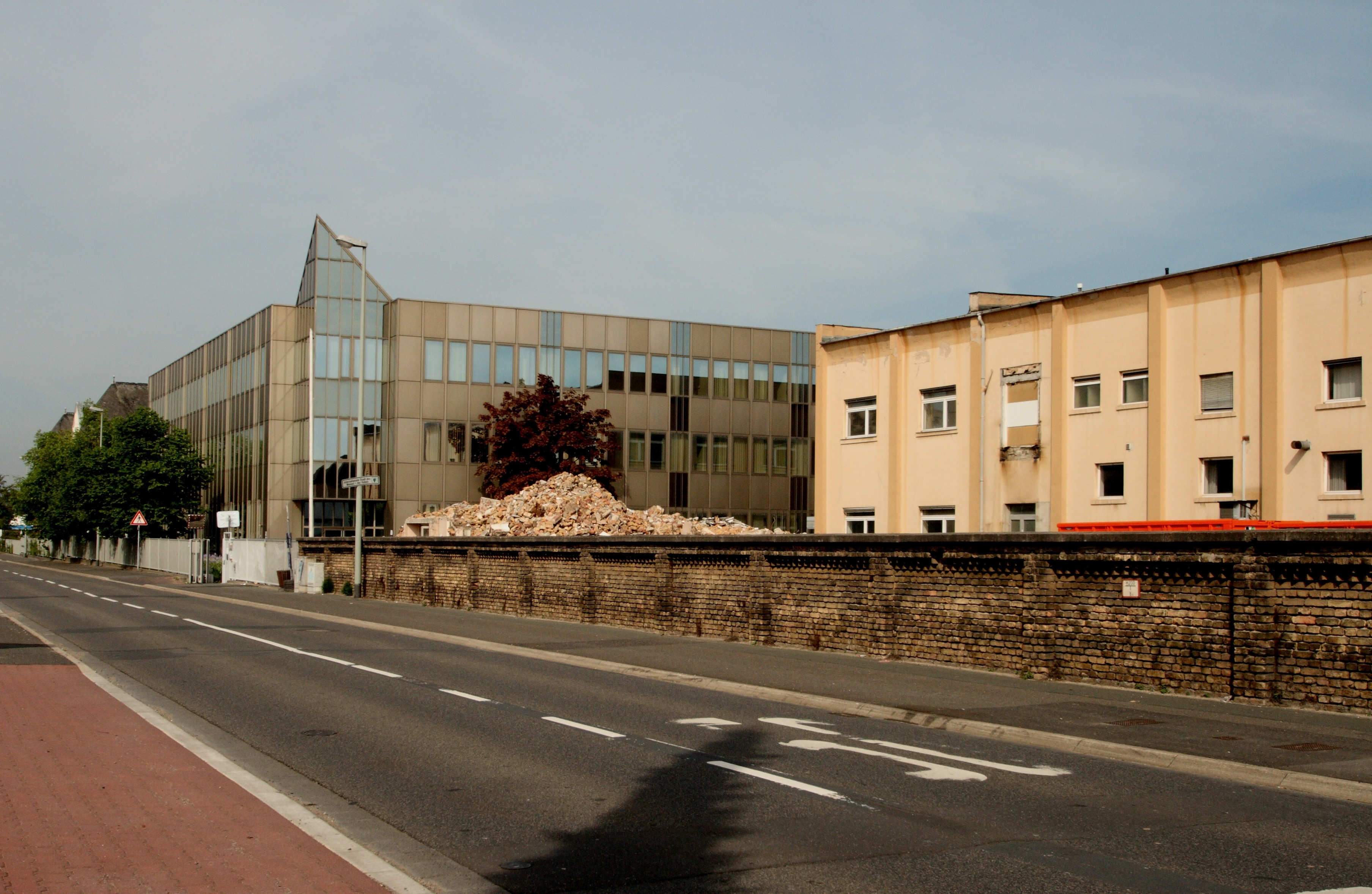 Links: Ehemaliges Bürogebäude ("Glaspalast") der Miller Johannisberg GmbH, erbaut 1988, bezogen 1989. Rechts: Gebäude der ehemaligen Maschinenfabrik Johannisberg Geisenheim. Chauvignystraße, Geisenheim.